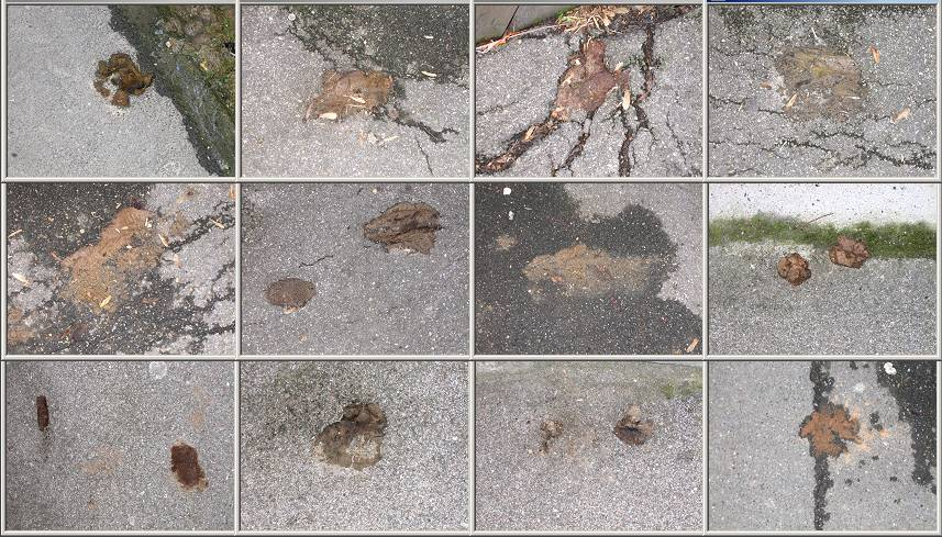 Hundehaufen Zeit der Aufnahmen: 16:42 bis 16:47 Ort: Stuttgart-Feuerbach